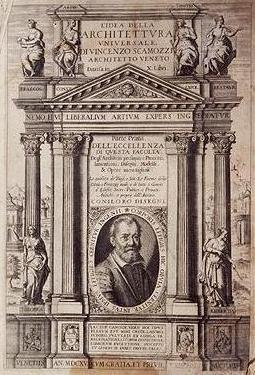 L'idea della Architettura universale Di Vincenzo Scamozzi Architetti Veneto. Woodcut